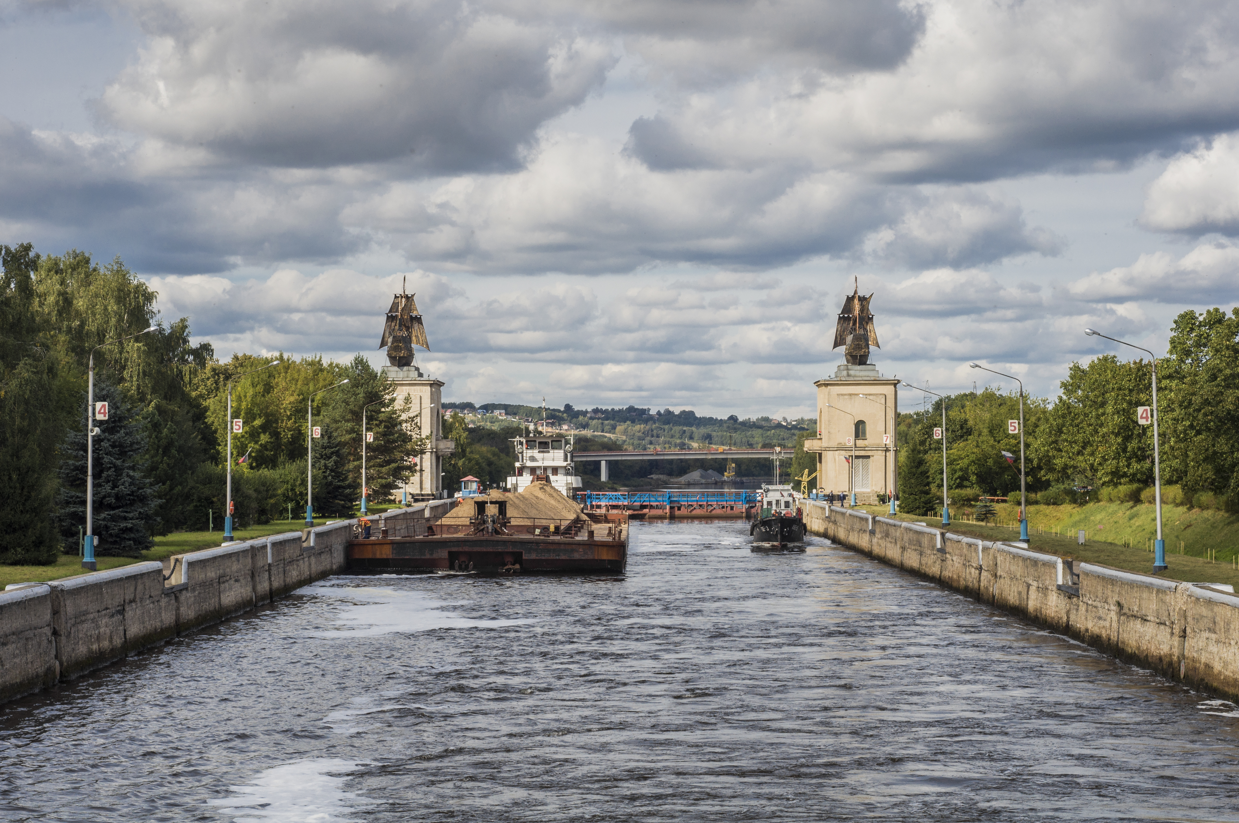 Шлюз № 3 канала им. Москвы: Яхрома, Дмитровский район, Московская область. Снято с борта теплохода "Георгий Жуков".